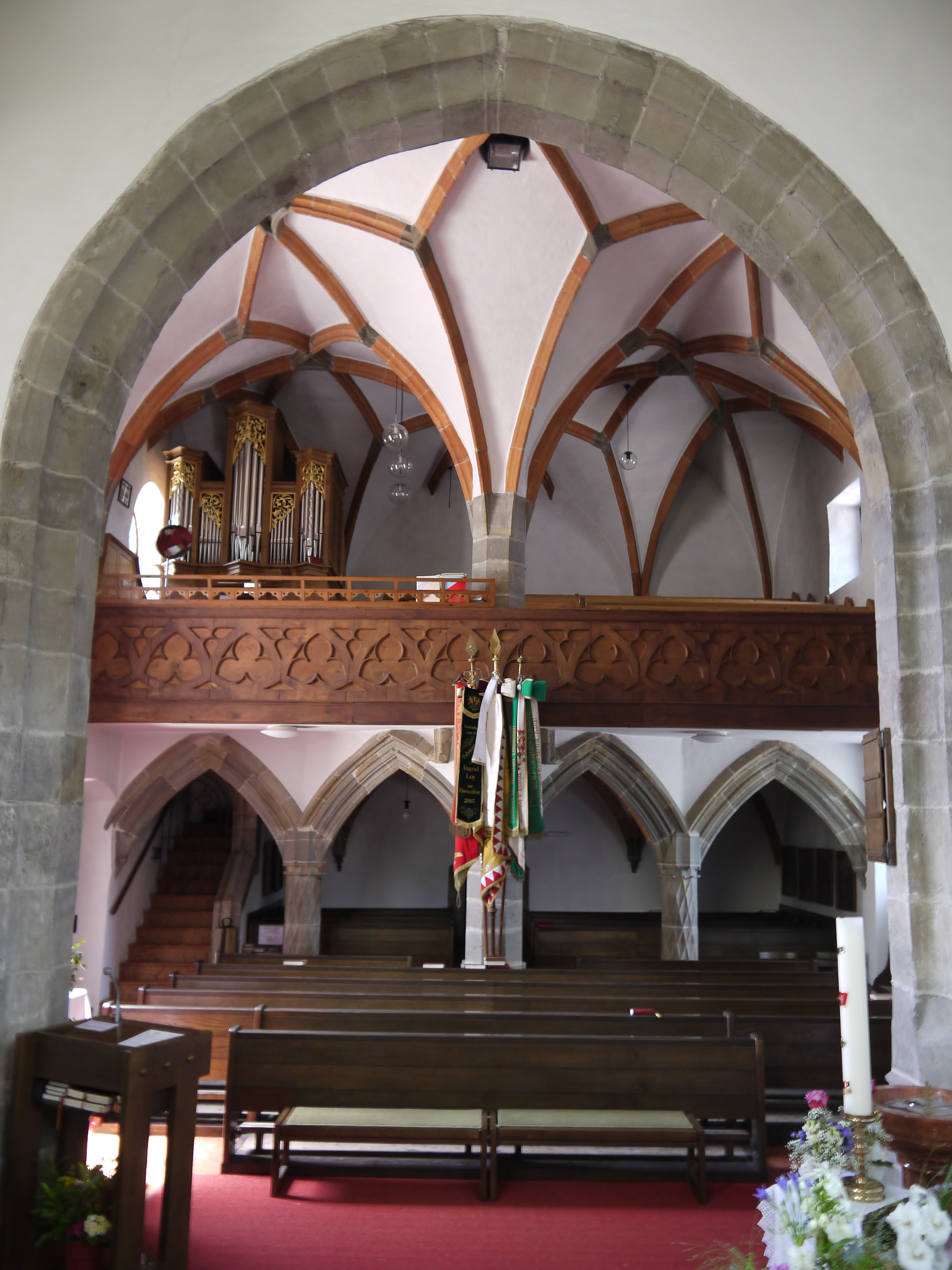 Kath. Pfarrkirche hl. Andreas mit Friedhof